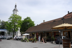 Stemmerhof